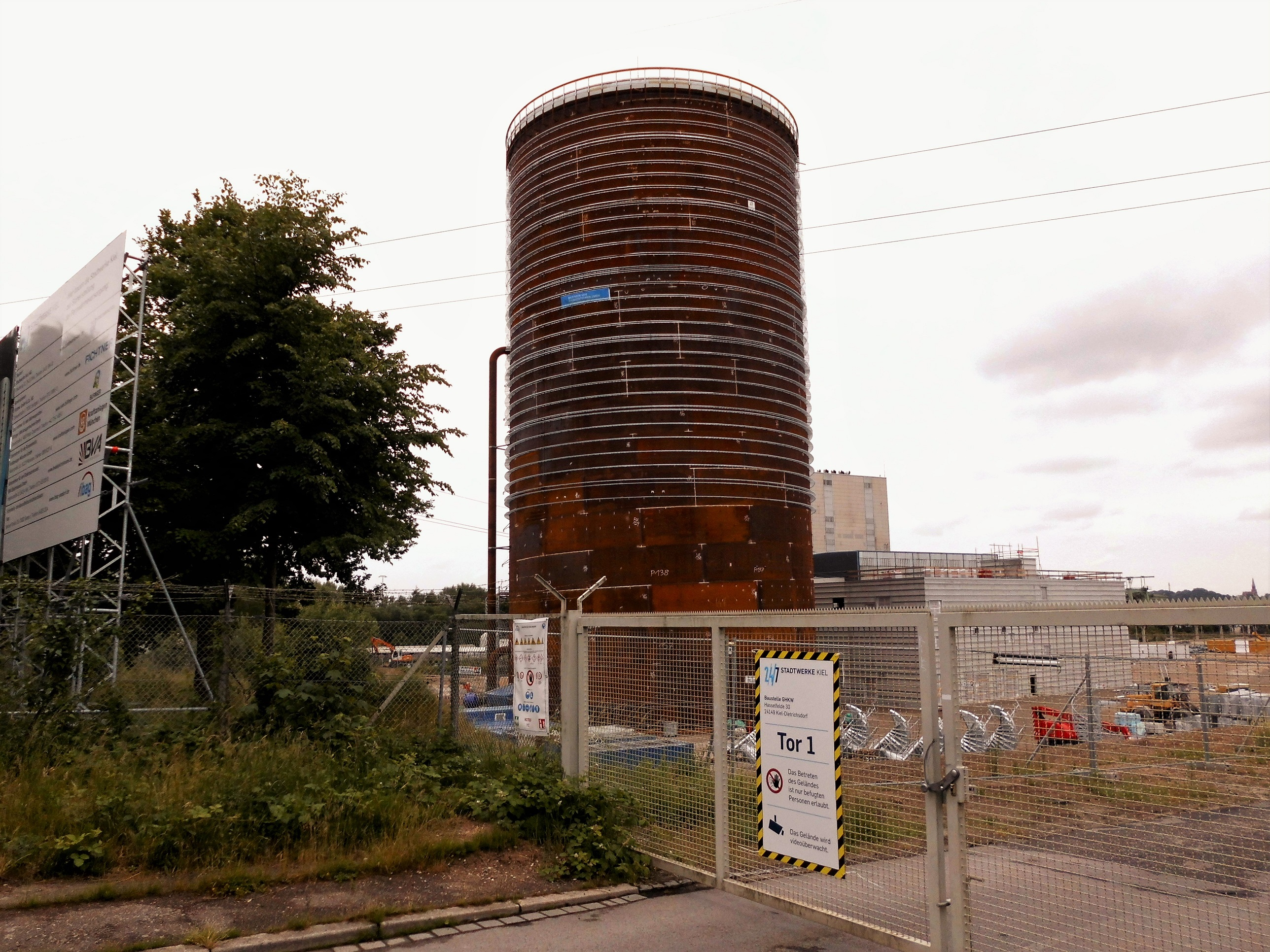 Kieler Fernwärmespeicher im Bau.